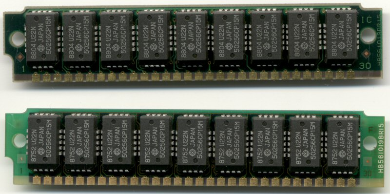 Zwei SIMM-Speichermodule mit jeweils 9 Speicherbausteinen. zwei 30-polige SIMM-Riegel. Leiterplatte, Speichermodul bzw. SIMM (PLCC18).